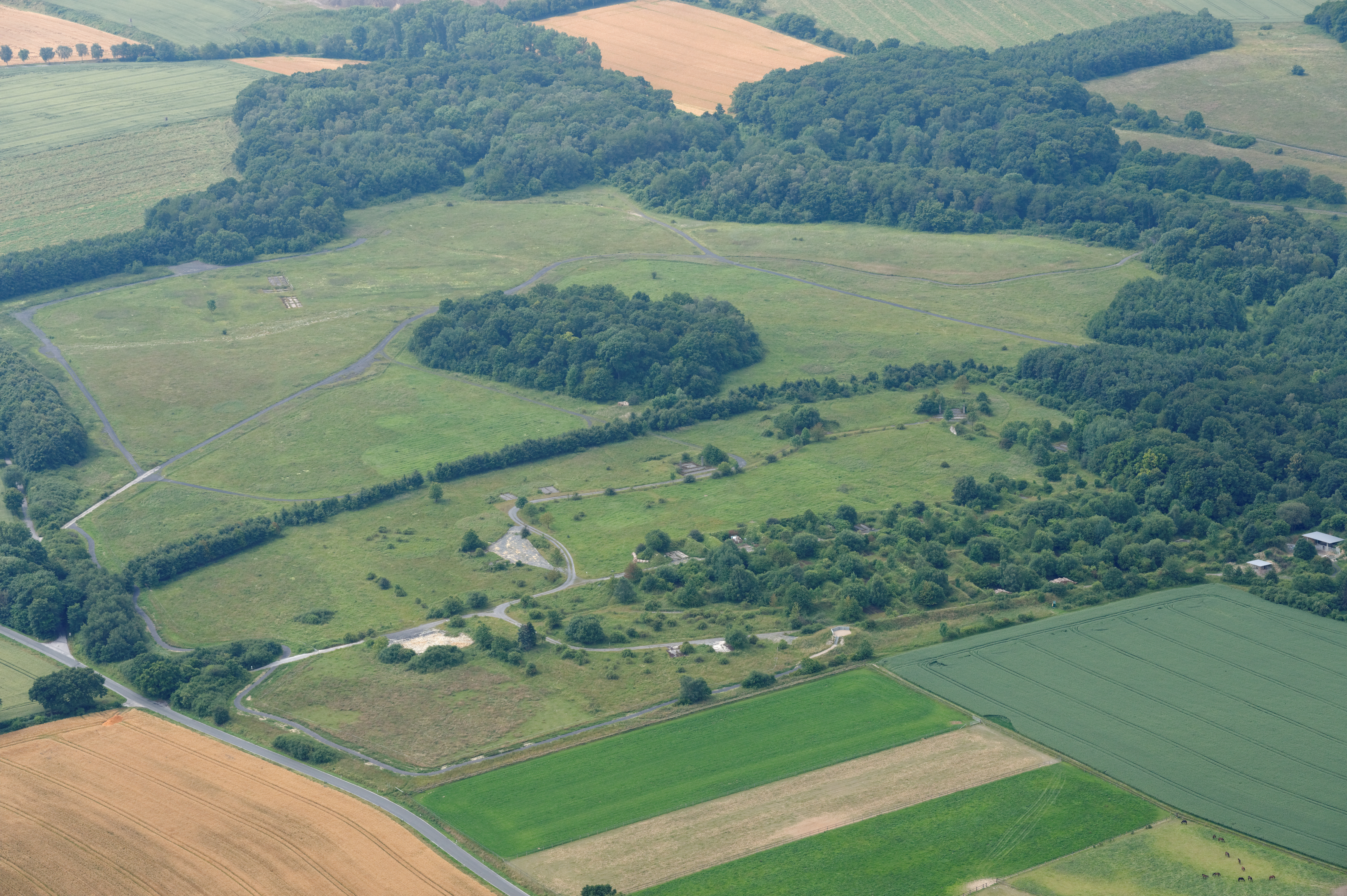 Fotoflug Sauerland-Nord. Naturschutzgebiet Standortübungplatz bei Büecke, ehemalige Patriot-Stellung, Landesstraße 670, Blickrichtung Süd.